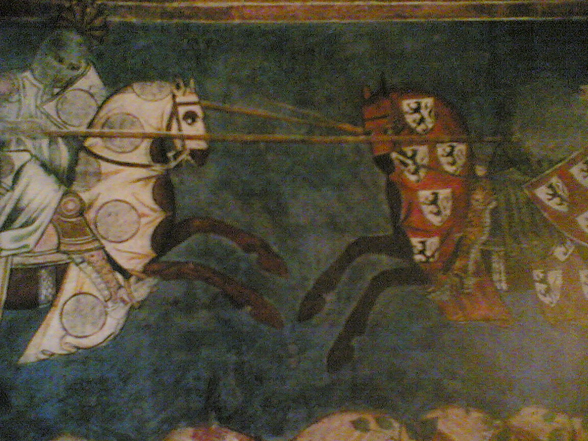 foto libera art comons di carlomarinobuttazzo